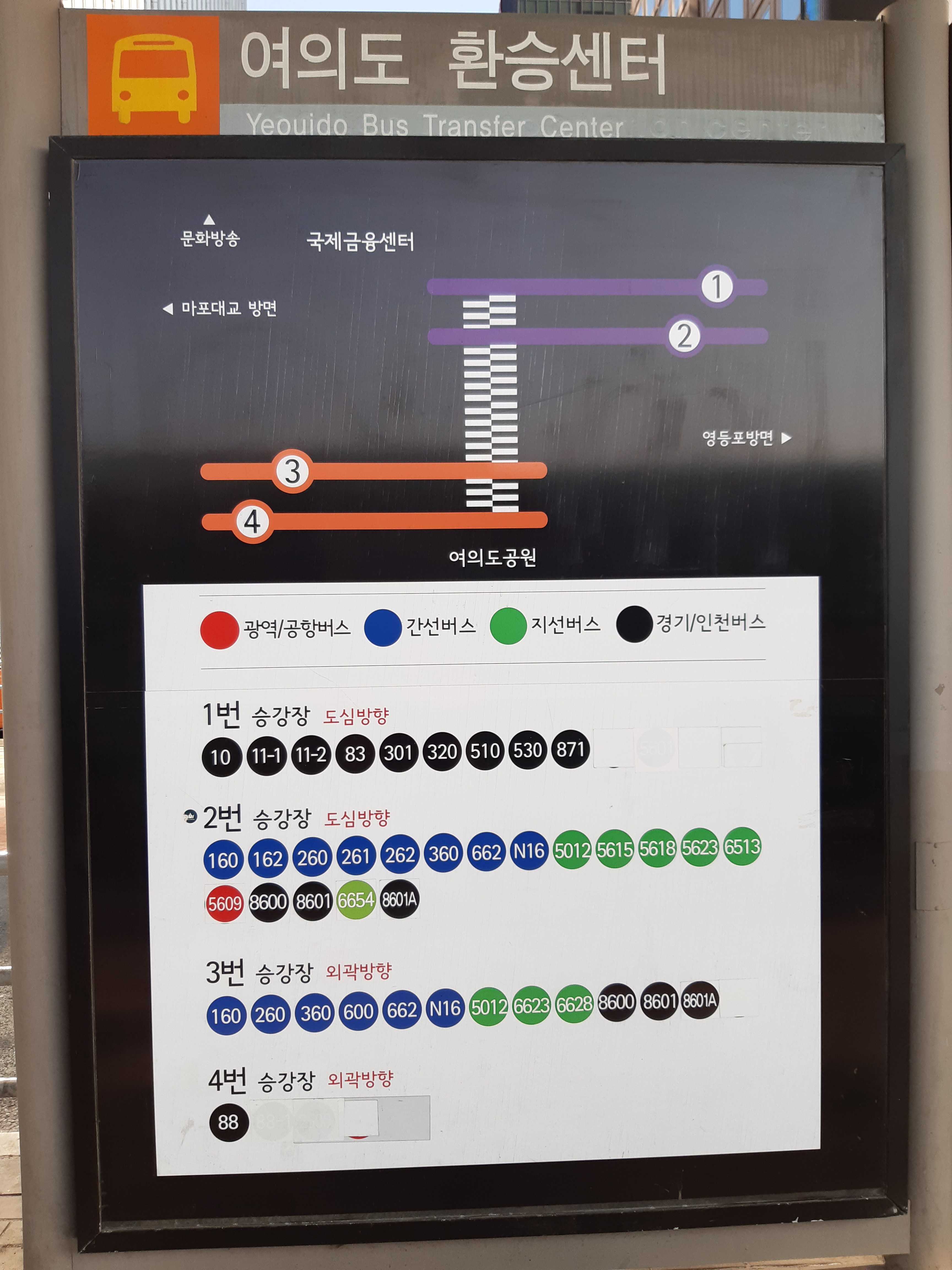 여의도 버스 환승센터 표지판